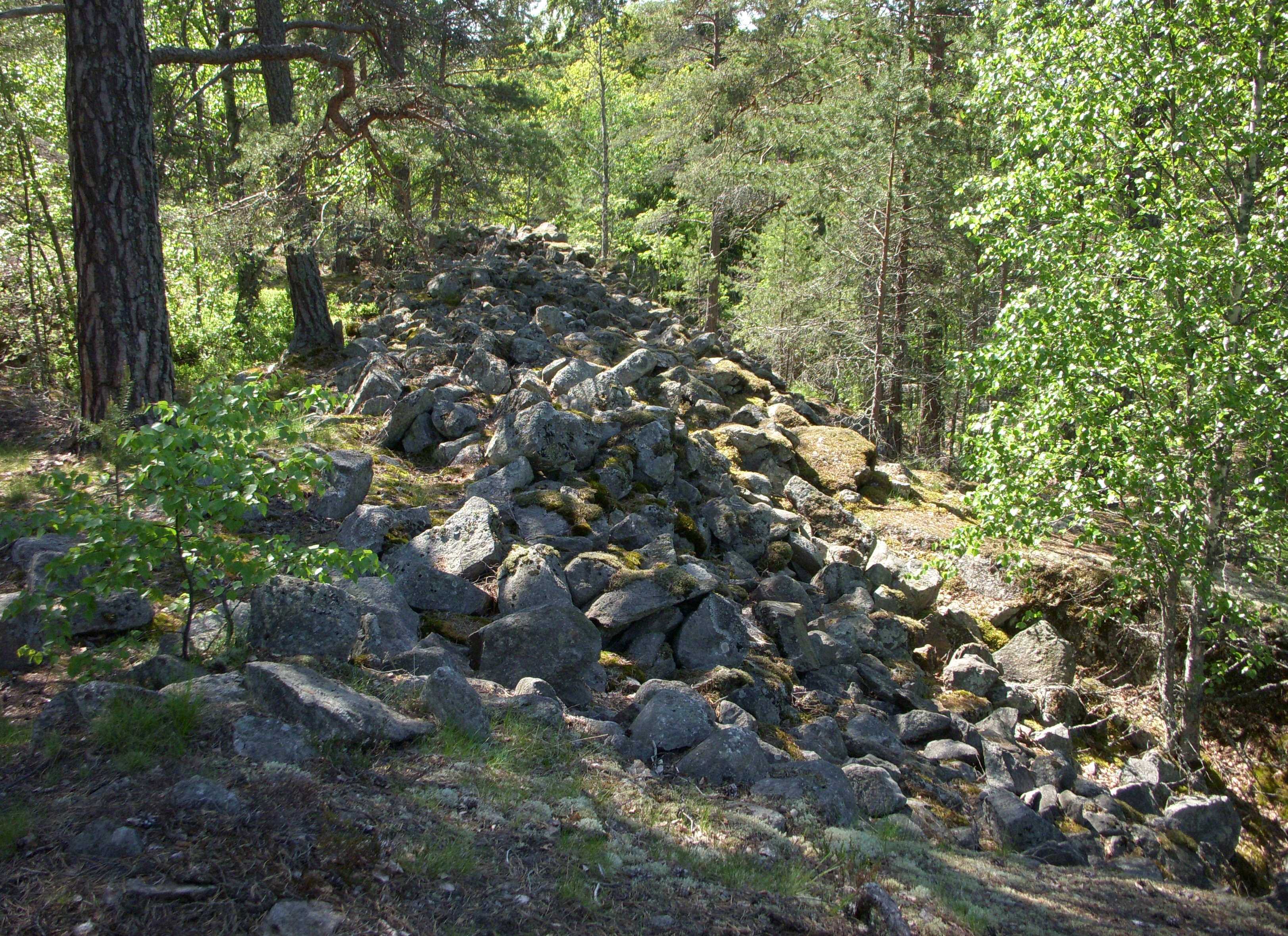 Stensättra fornborg i Huddinge kommun